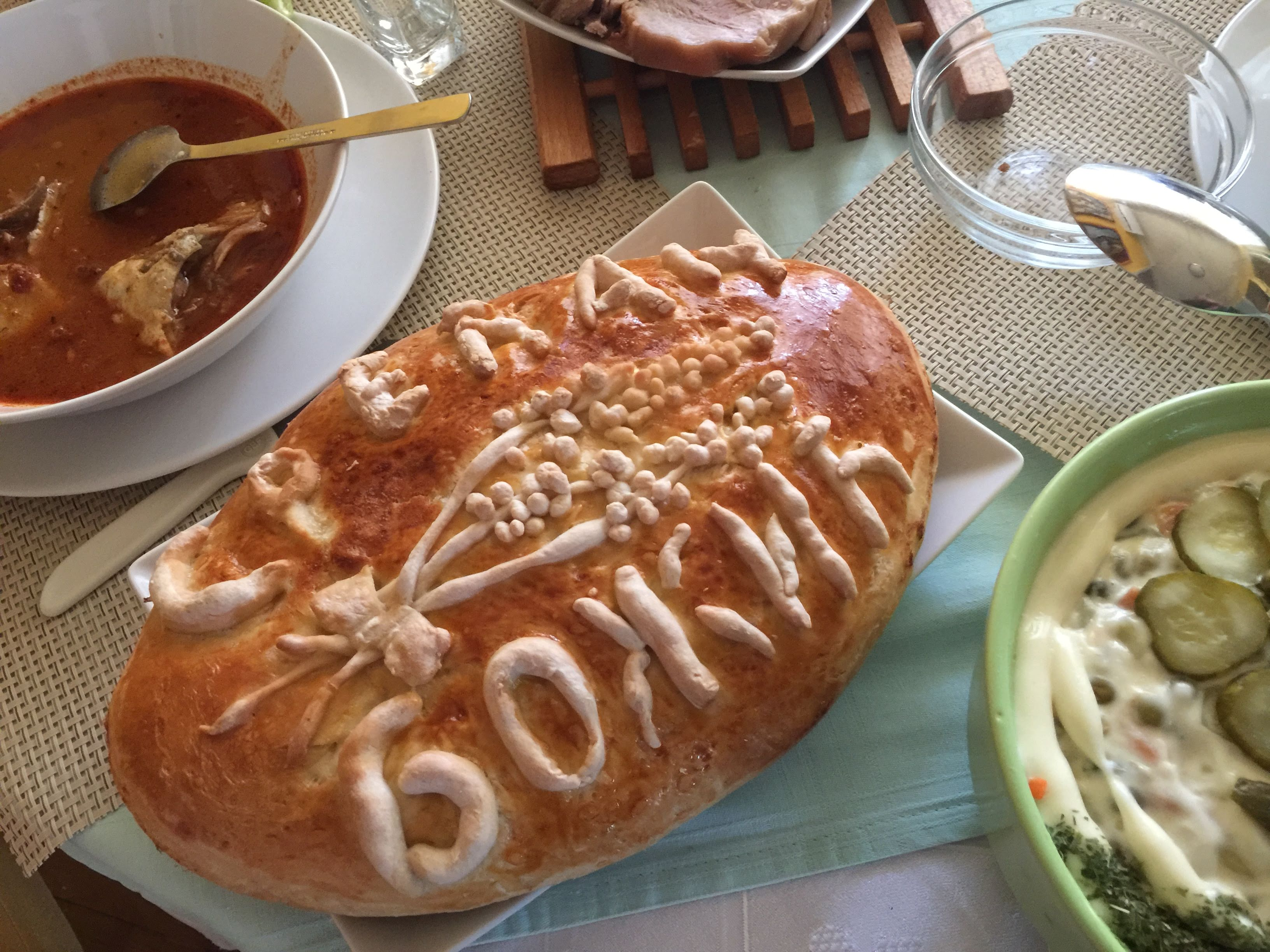 Srpski (latinica): Božićni obredni hleb